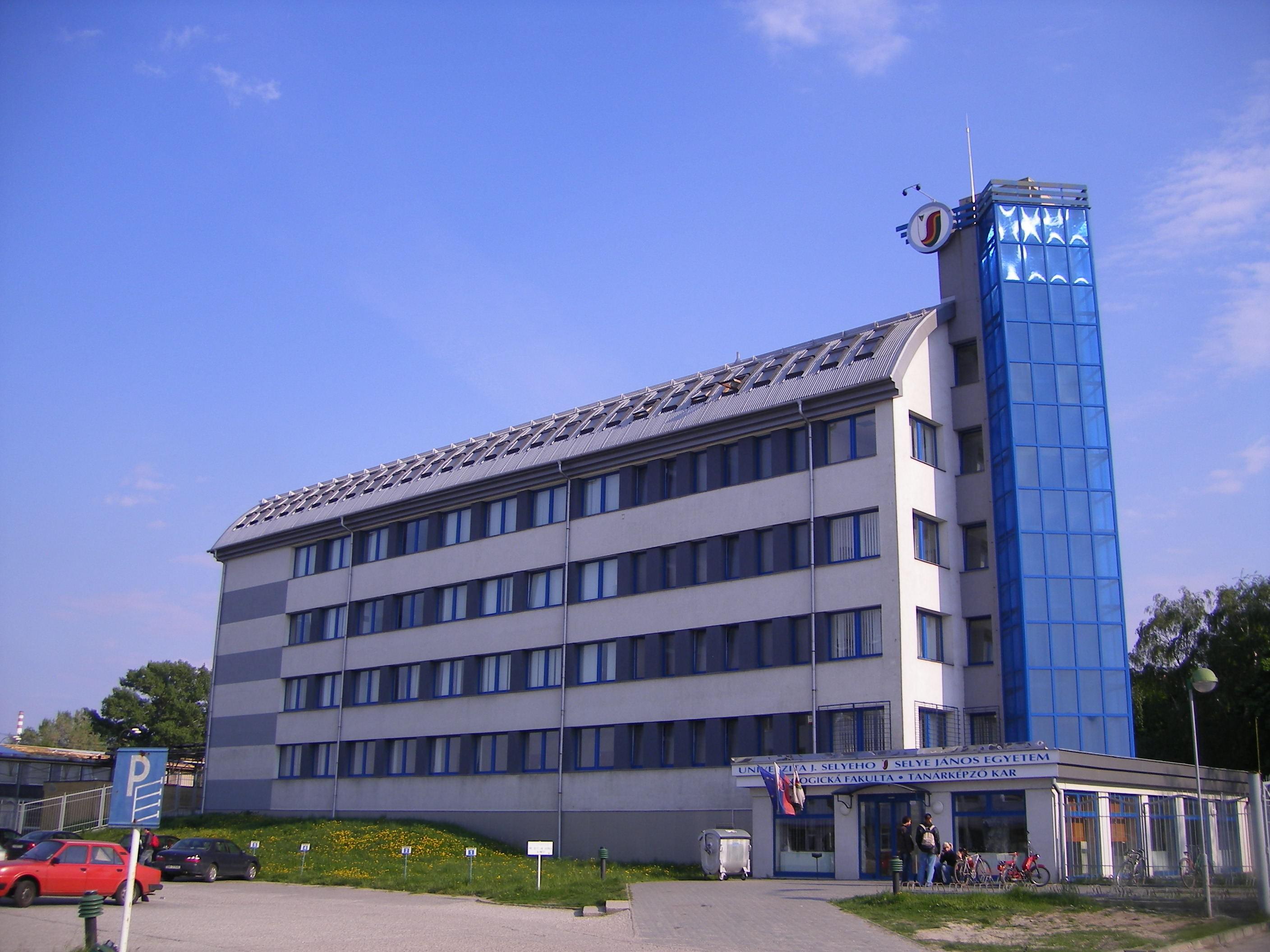 Komárom - Selye János Egyetem - tanárképző kar